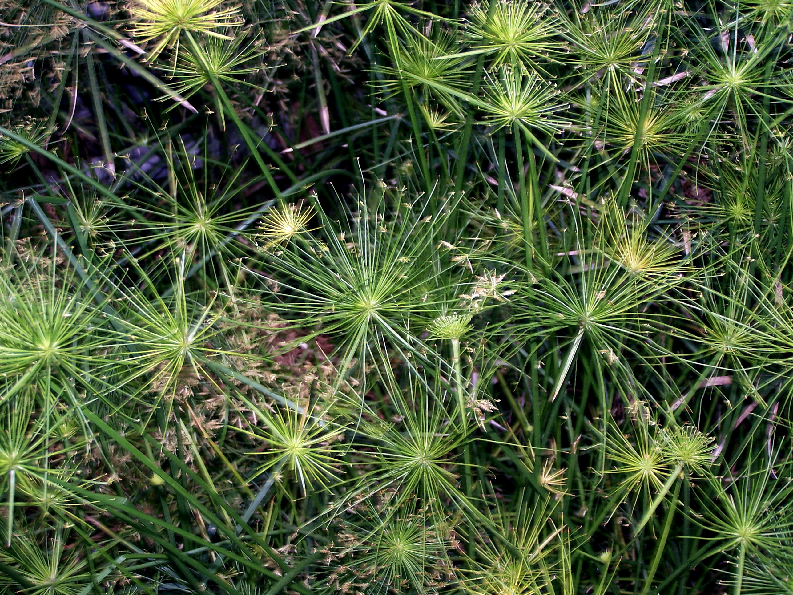 Cyperus haspan 17 juin 2006 Vieux jardin botanique de Göttingen